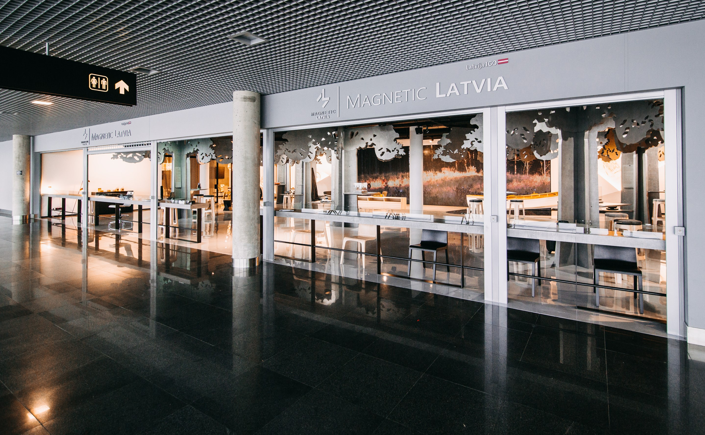 Magnetic